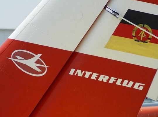 Logo der Interflug auf einer Museumsmaschine